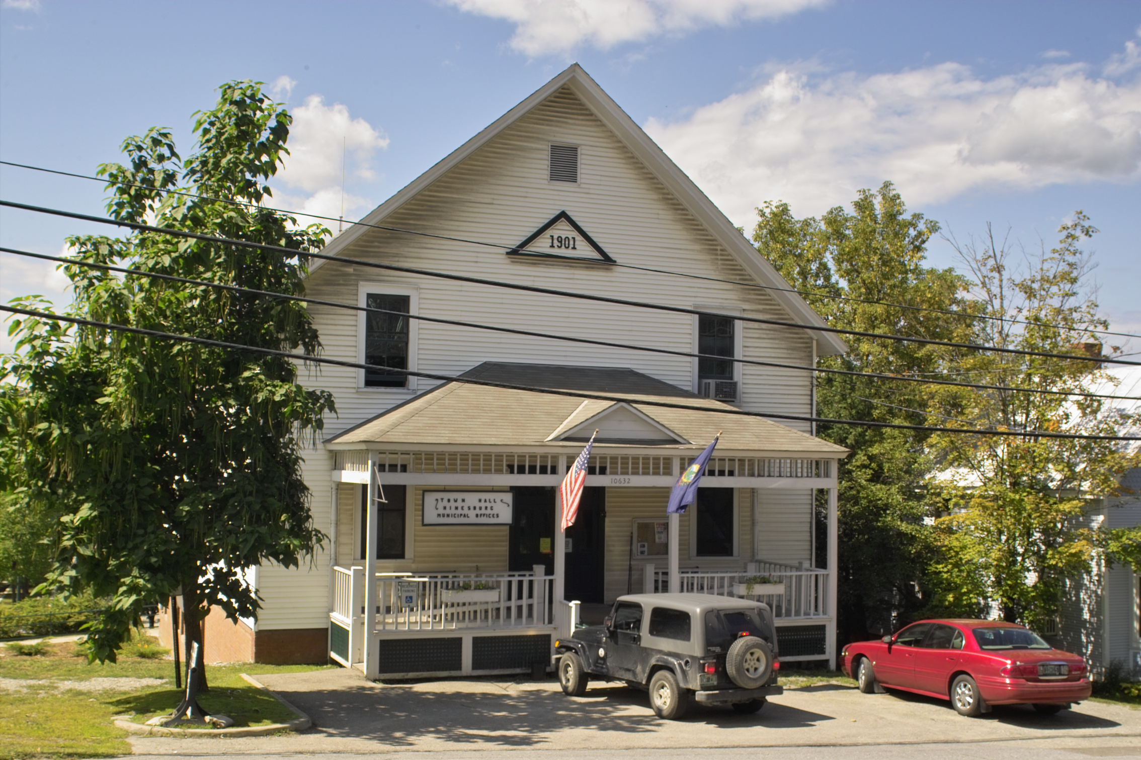 Town Hall in Hinesburg, Vermont, USA.